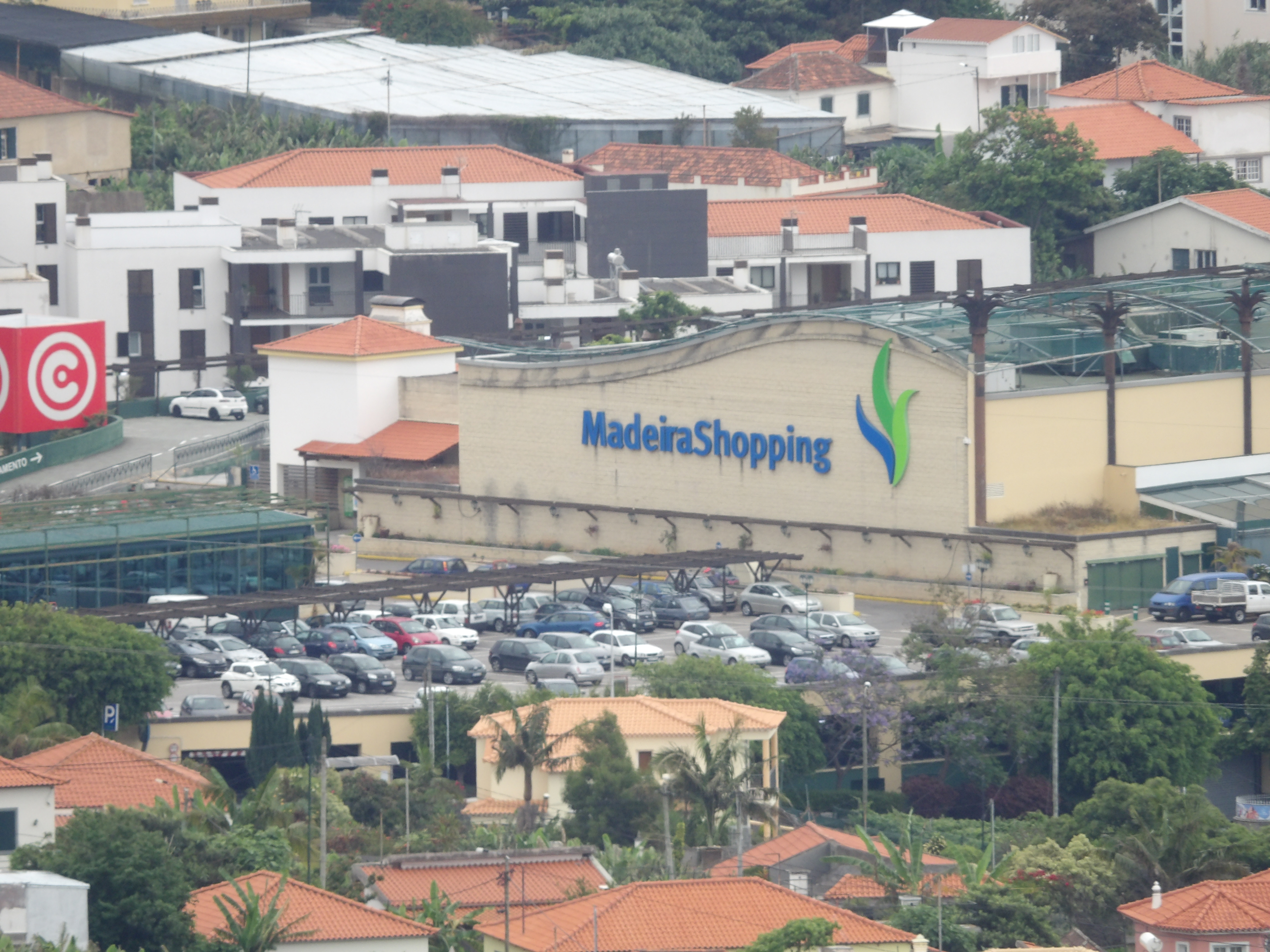 Centro Comercial, Madeira Shopping